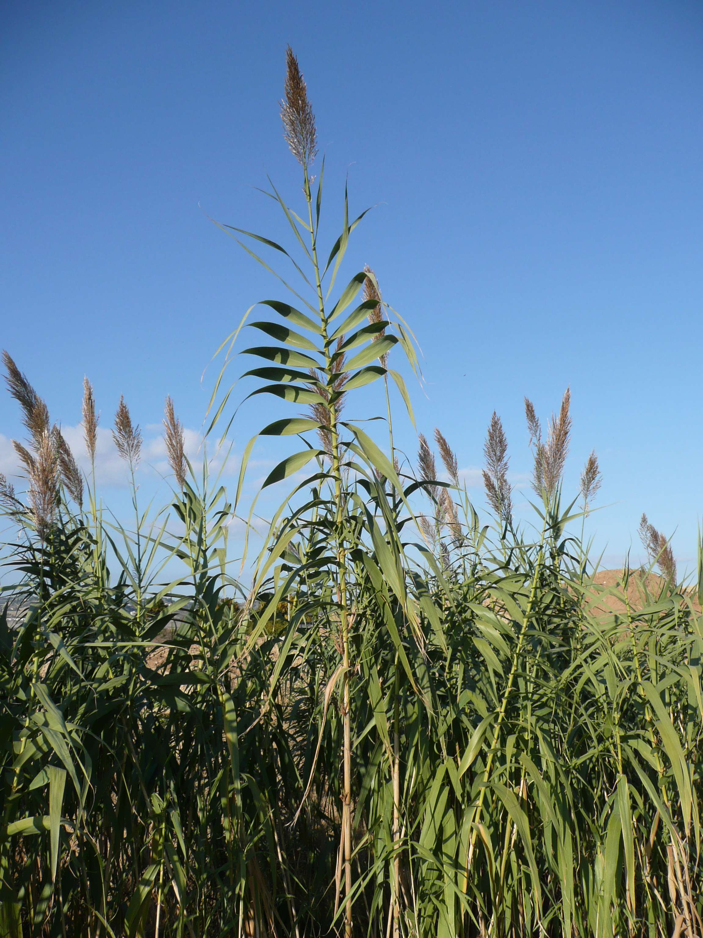 Arundo donax, Colonnella, Abruzzi, eastern Italy.